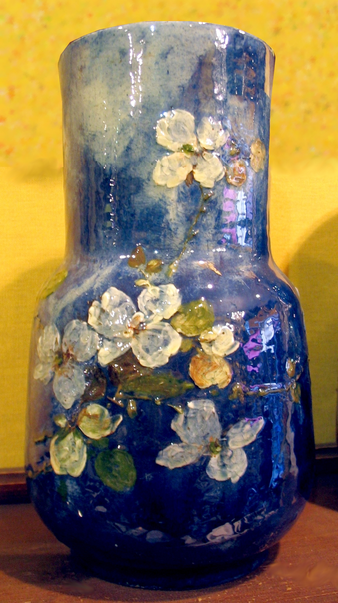 Vase par Théodore Haviland, Limoges, France vers 1890